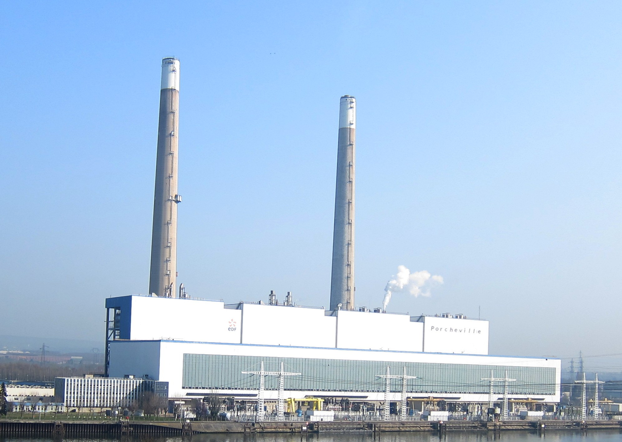 Centrale électrique de Porcheville